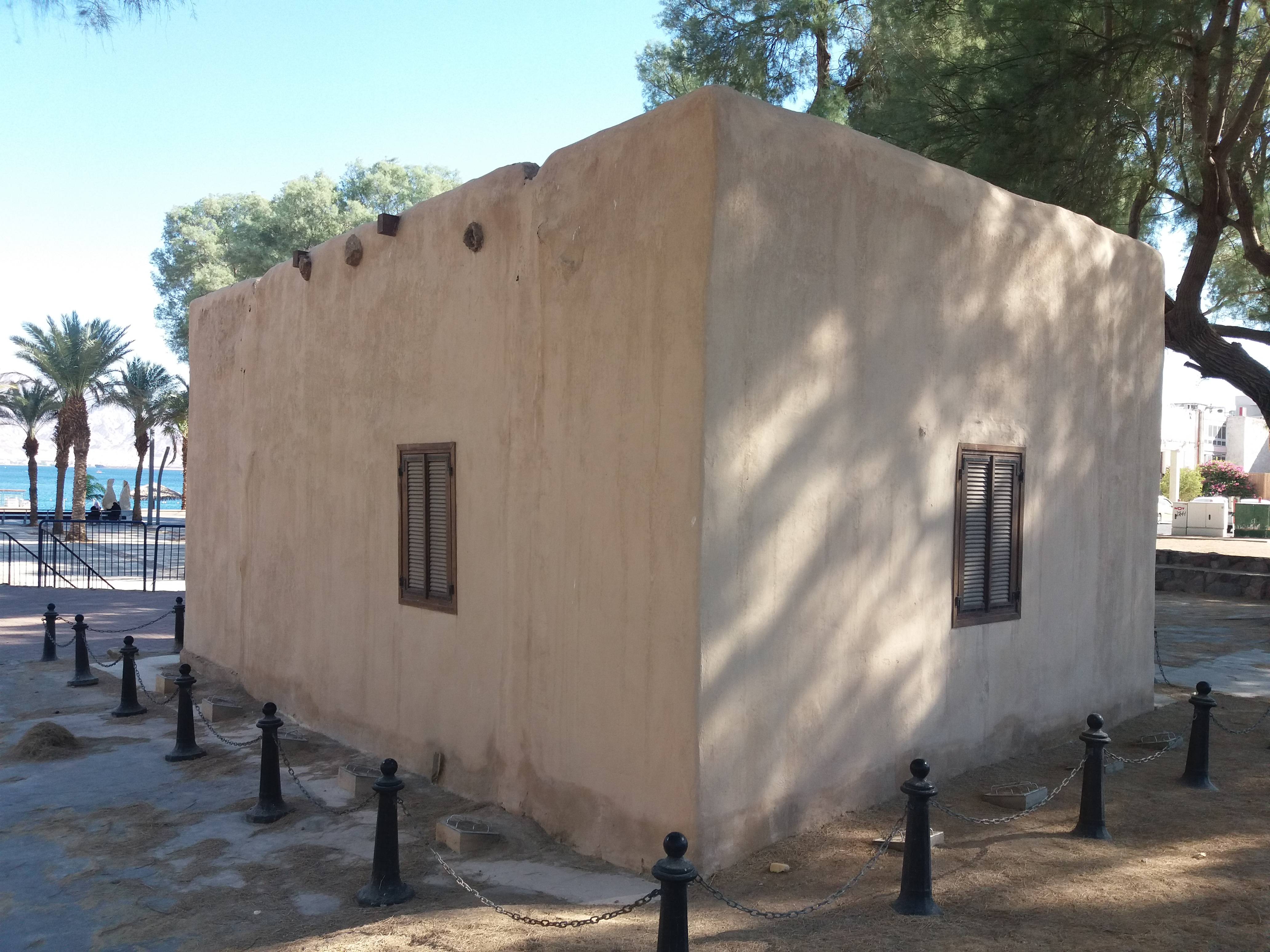 מבנה משטרה בריטי ששכן באום רשרש (אילת) ונכבש על ידי צה"ל במלחמת העצמאות במבצע עובדה. מהמבנים שהיו באתר שרד כיום מבנה אחד, לידו הוצבה אנדרטה המשחזרת את מעמד הנפת "דגל הדיו" במבצע "עובדה".